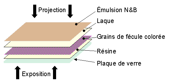 Schéma d'une plaque Autochrome